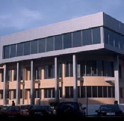 Ayuntamiento de Castrillón